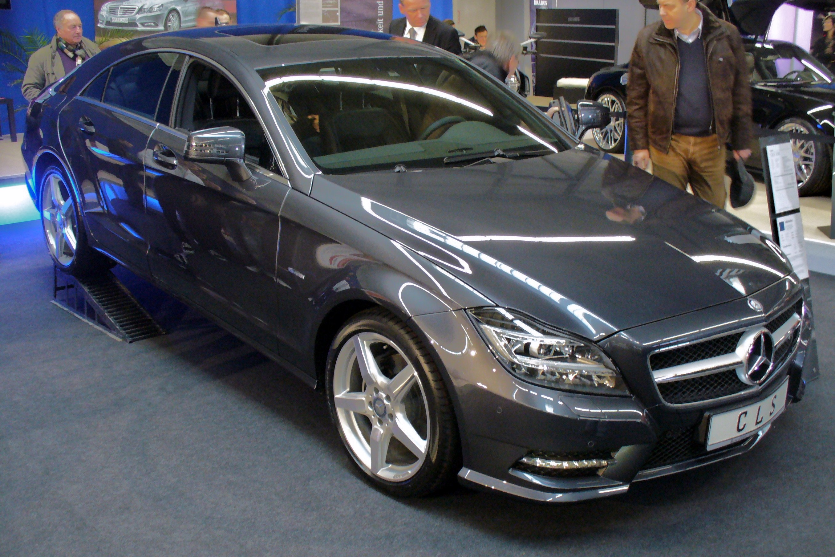 Mercedes-Benz CLS 350